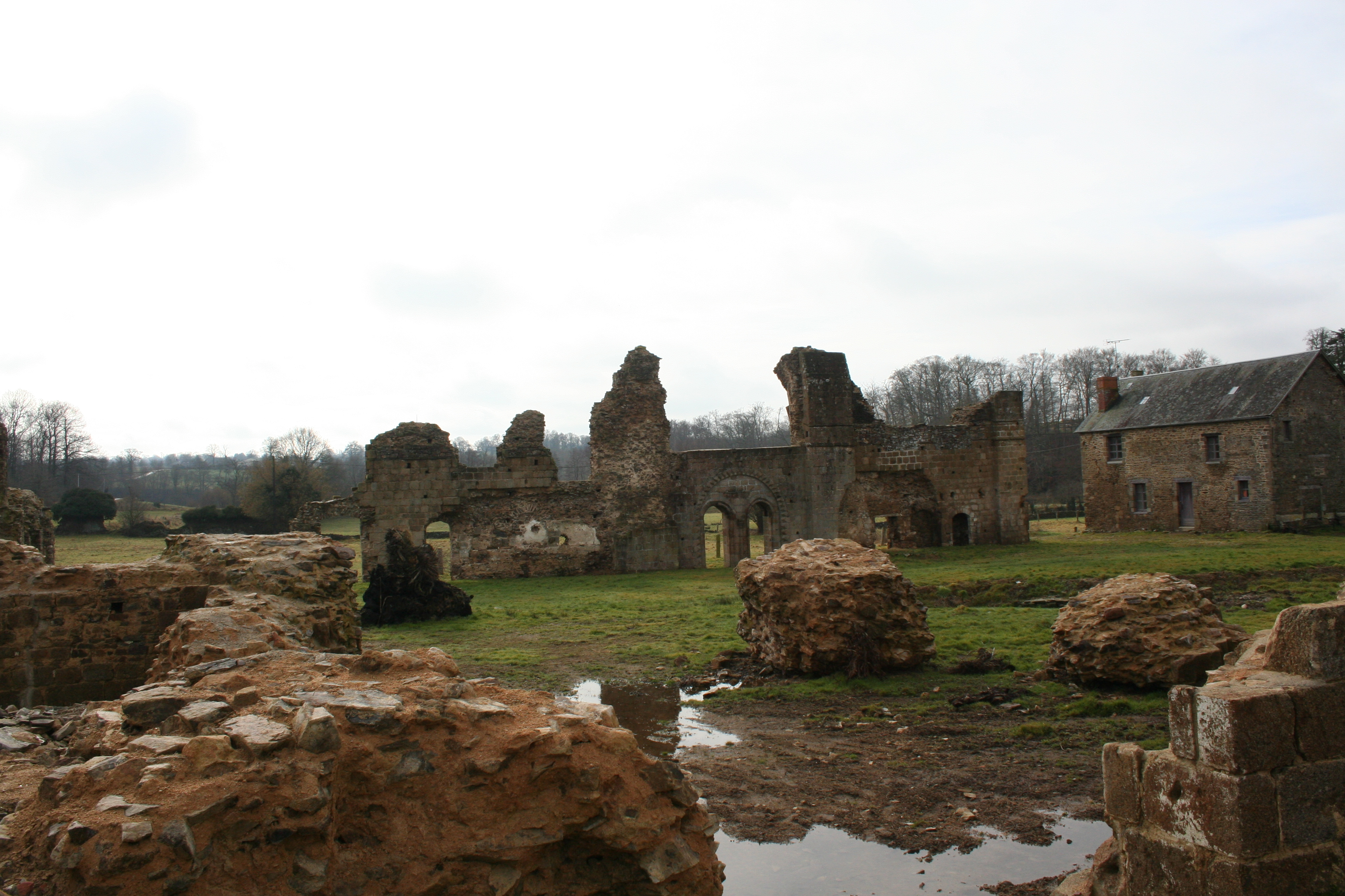 Le cloitre vue depuis l'intérieur de l'église, avec au milieu l'endroit du bassin. Vue des ruines de l'abbaye de savigny le vieux, manche, france